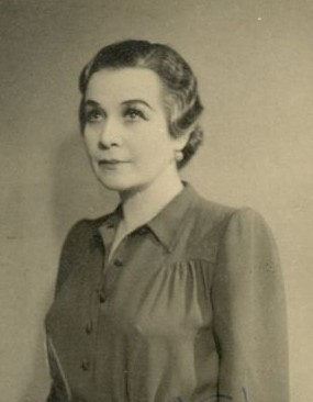 Míla Pačová (1887 - 1957), Česká herečka.